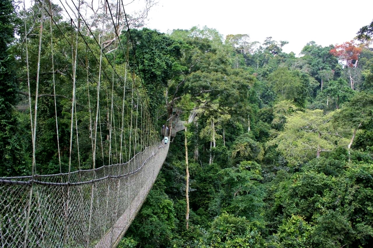 Kakum National Park - Kamum - Ghana Dicembre 2006 - Chiappi Nicola